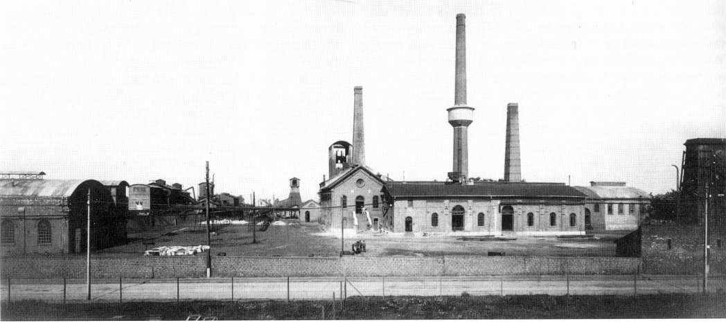 Grube Laurweg 1909, Aachener Revier